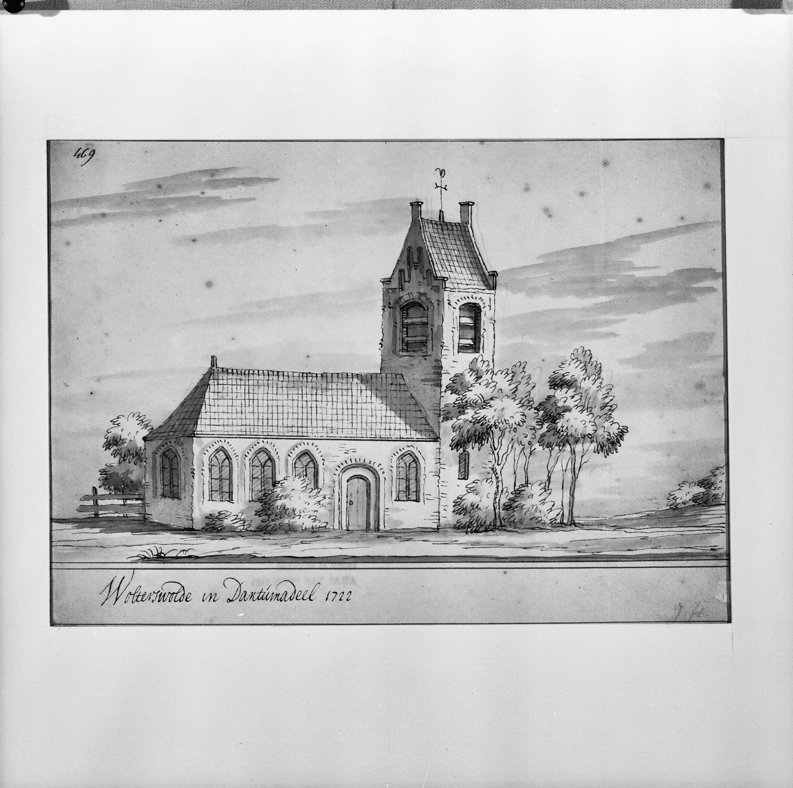 Nederlands Hervormde Kerk: exterieur, tekening 1722 van J. Stellingwerf, Origineel Friesch Museum